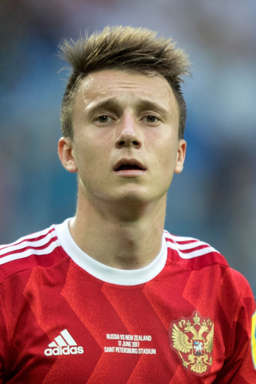 Россия - Новая Зеландия